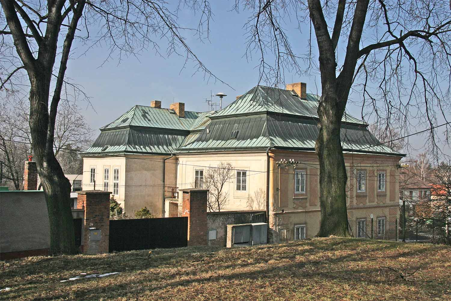 Radnice v Kaňku